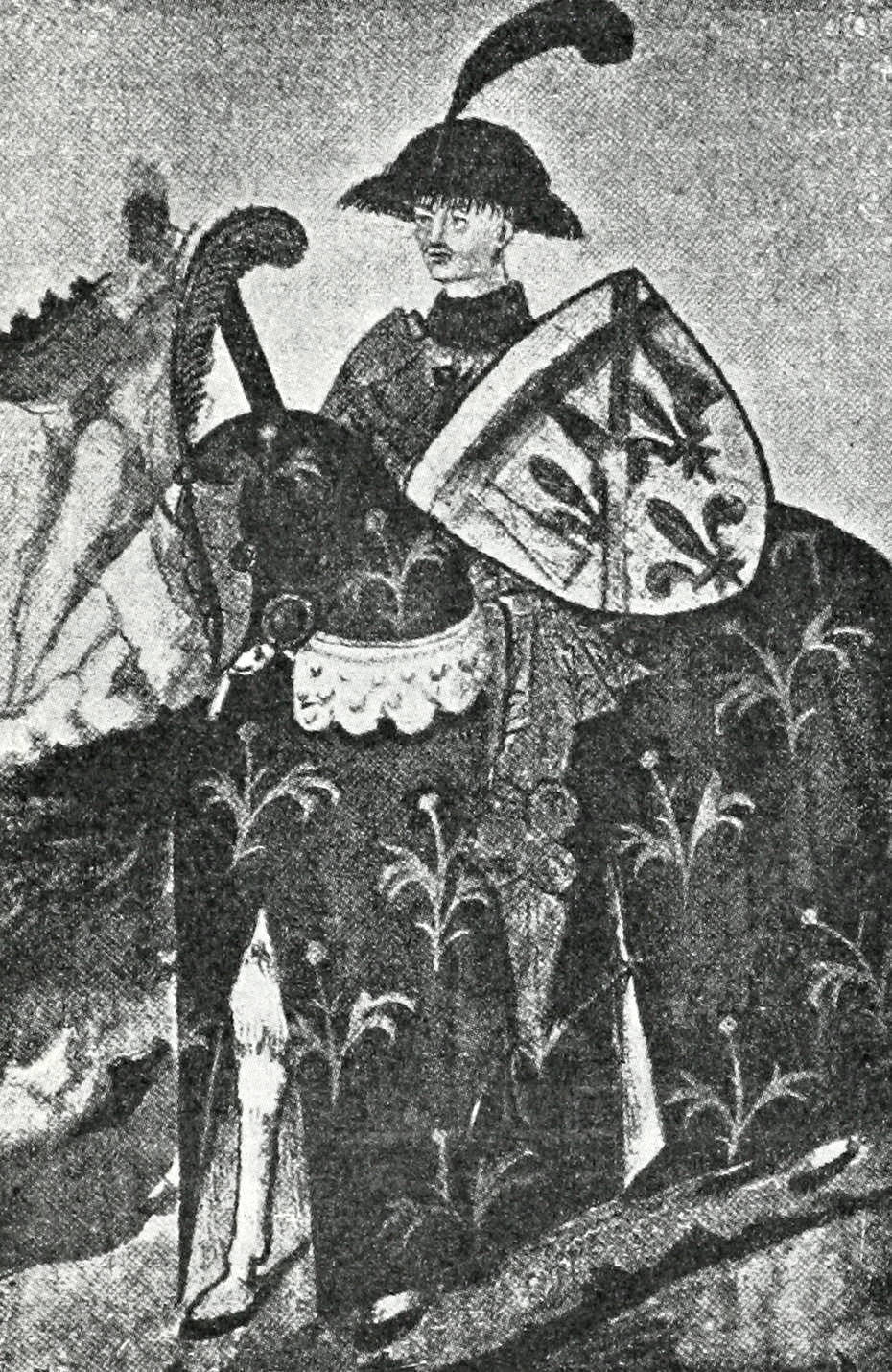 Это изображение было использовано для иллюстрирования статьи «Дюнуа, Жан, граф» опубликованной в девятом томе «Военной энциклопедии», который был издан книгоиздательским товариществом И. Д. Сытина в 1912 году в столице Российской империи городе Санкт-Петербурге.